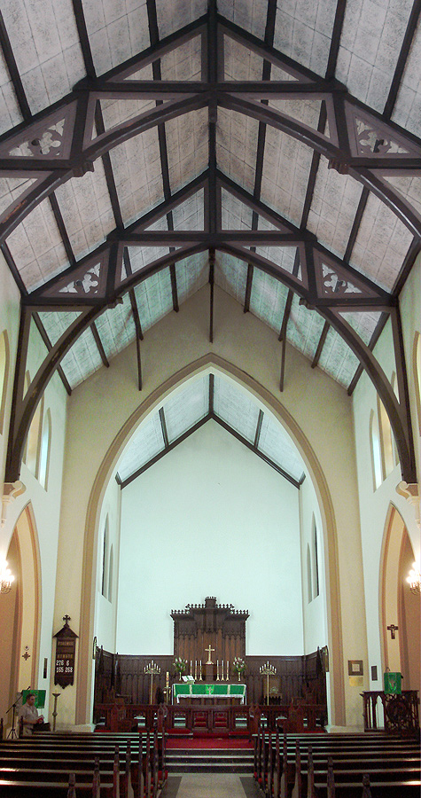 Interior da Catedral Anglicana da Santíssima Trindade, Porto Alegre, Brasil.